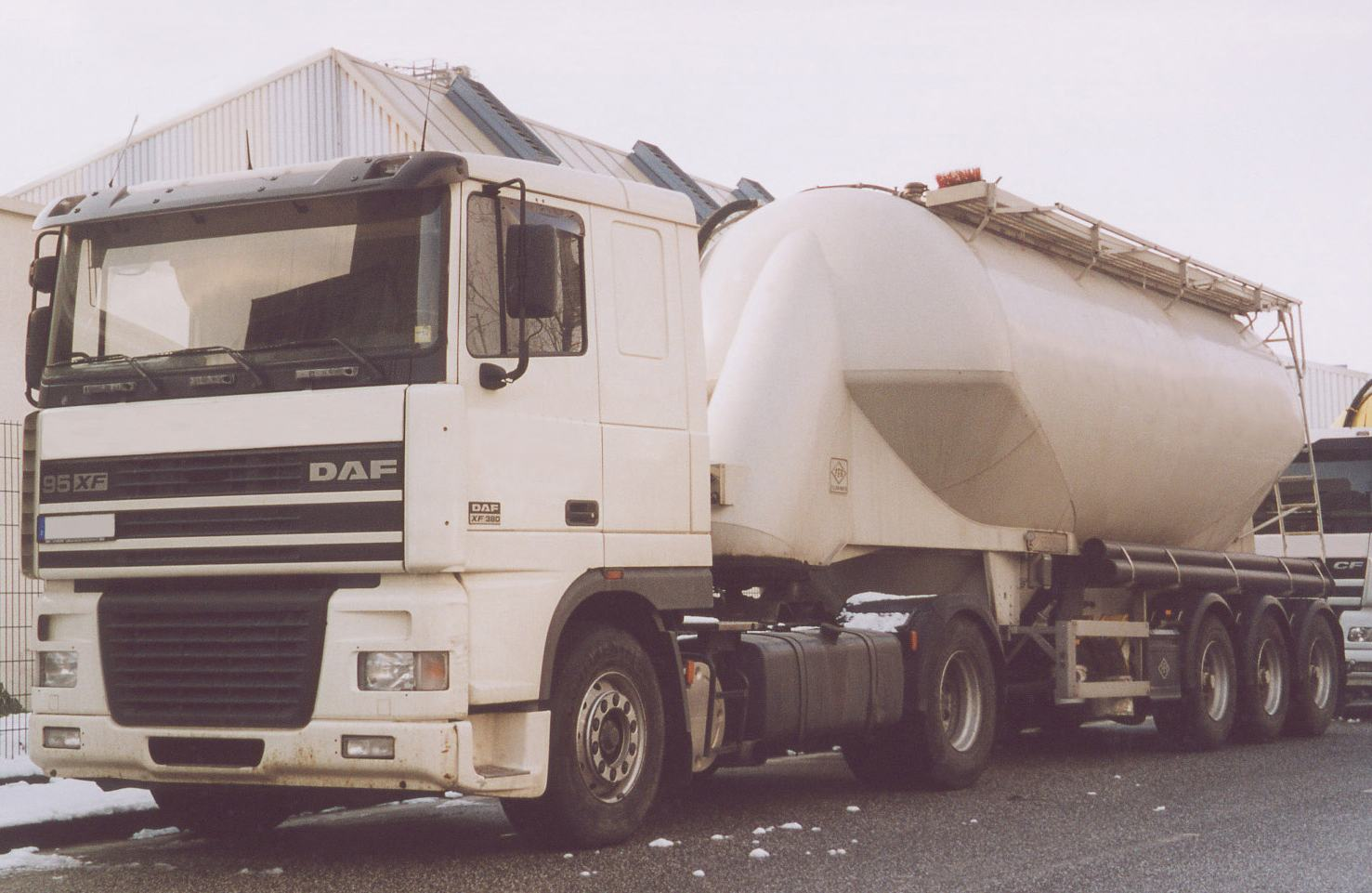 DAF 95XF Silosattelzug